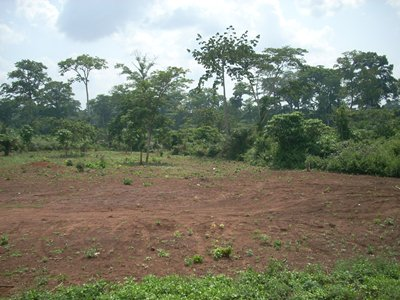 Observation Spatiale des Forêts Tropicales Bassin du Congo - Exemple de forêt (RCA)